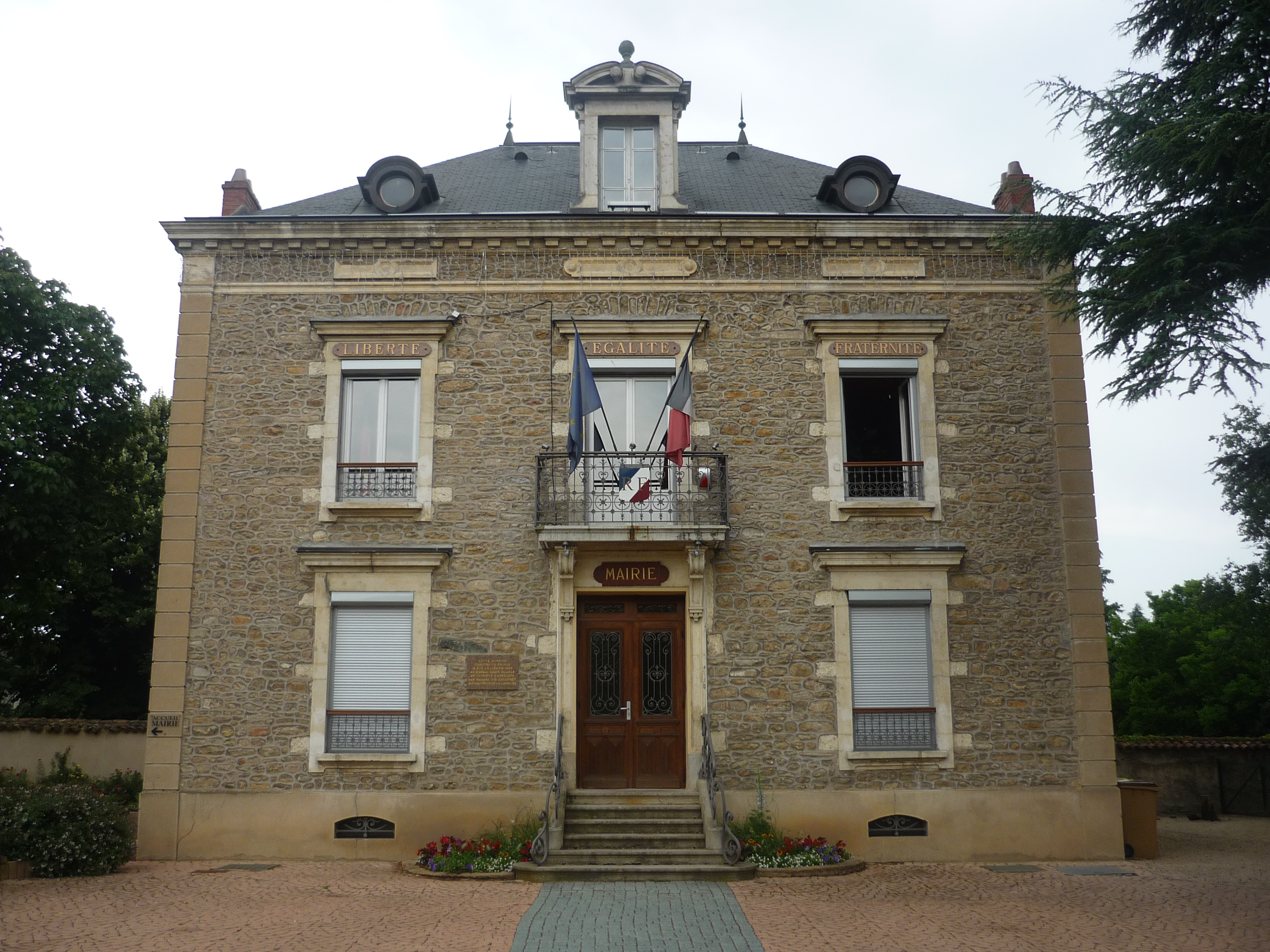 Mairie de Civrieux-d'Azergues, dans le département du Rhône